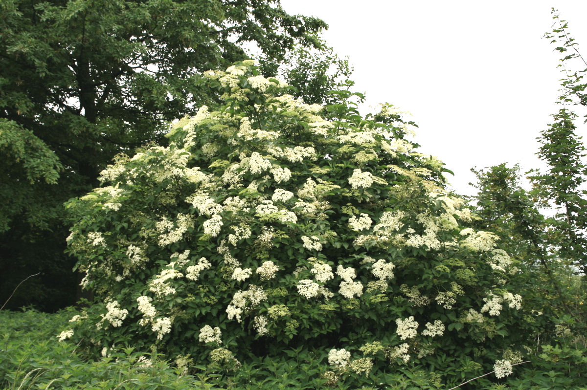 Gewone Vlier